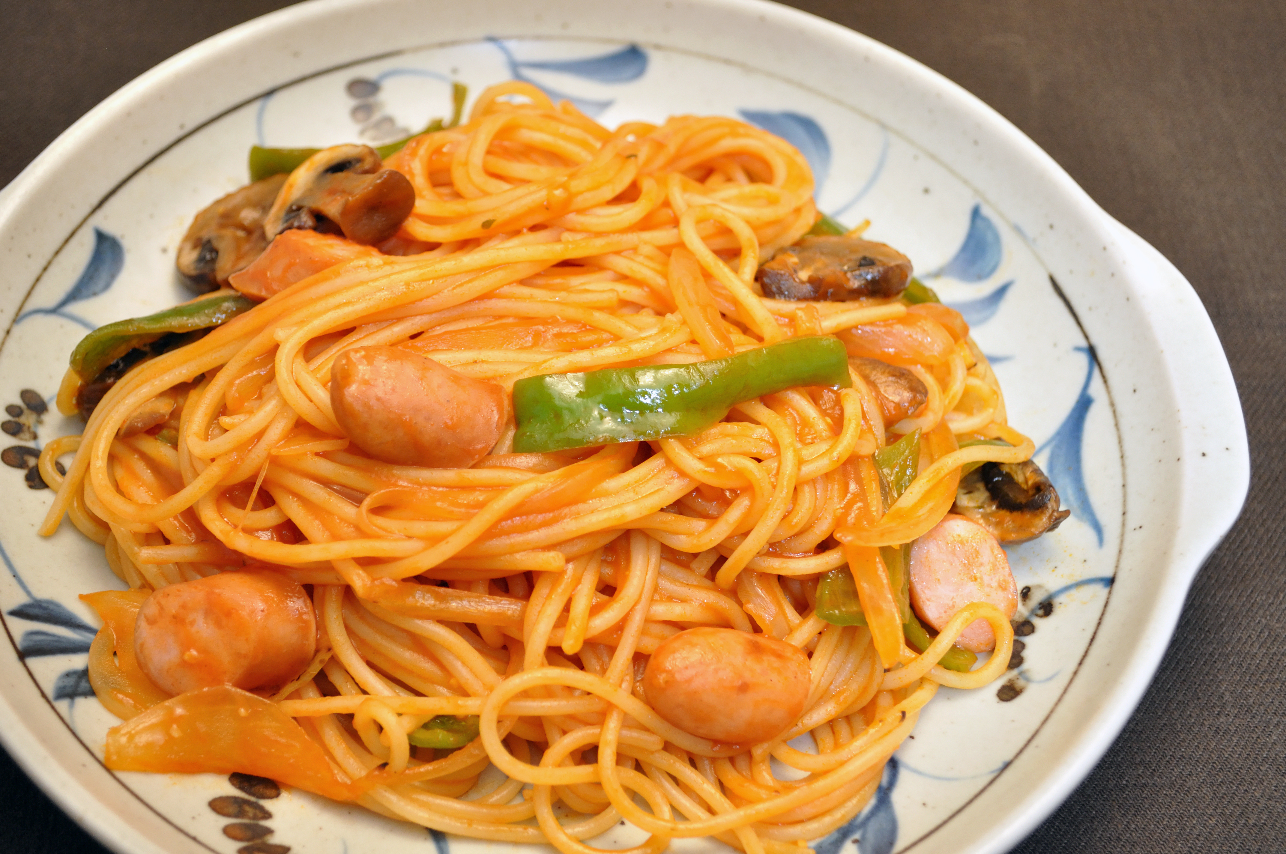 典型的なスパゲッティナポリタンの参考画像